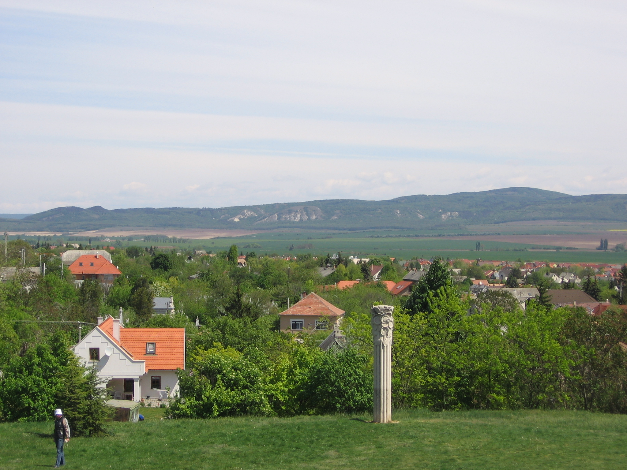 Buda Hills (Budai hegység), Hungary, seen from Zsámbék Wzgórza Budzińskie (Budai hegység) - widok z Zsámbék